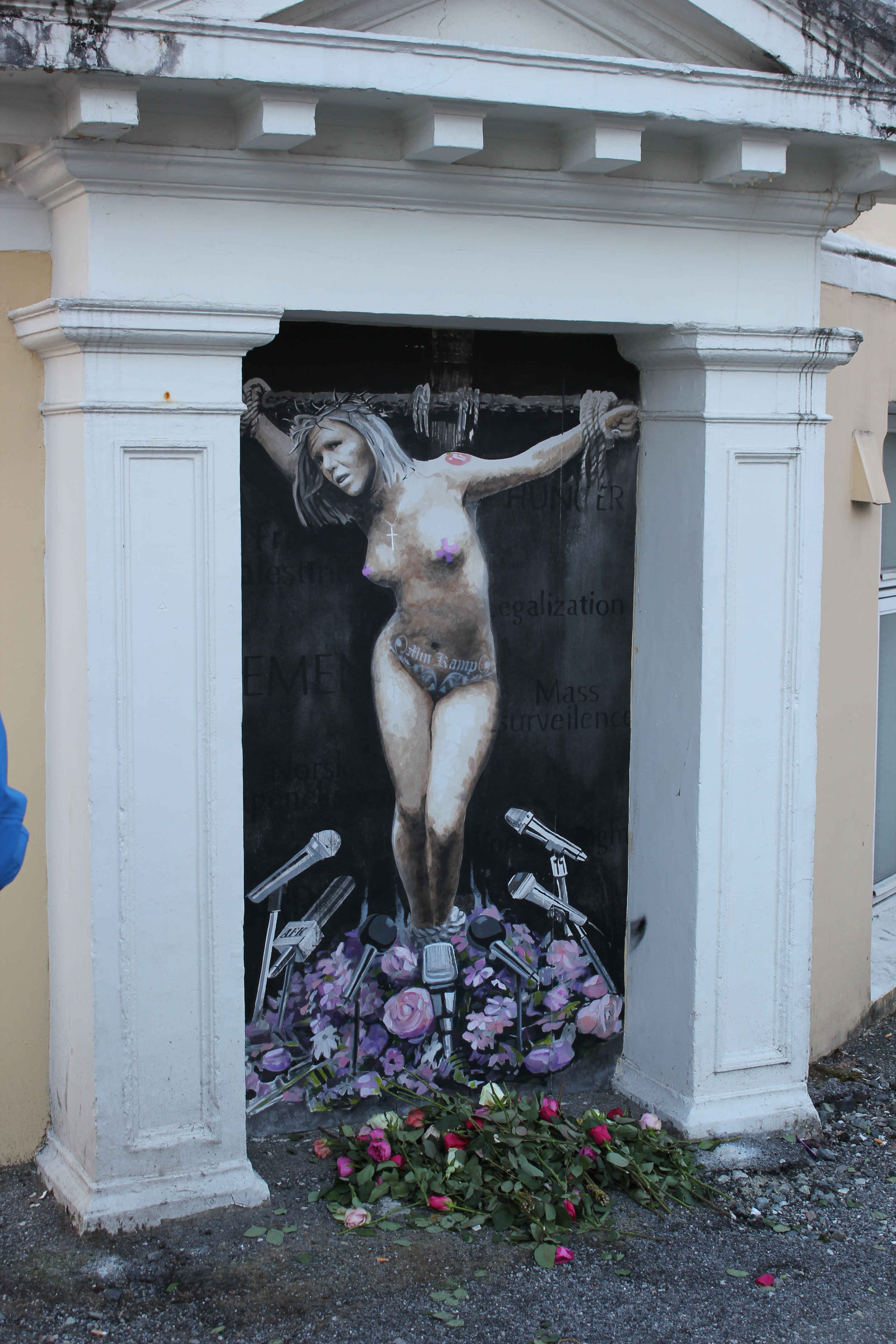 Gatekunstverket Making a Martyr av AFK i krysset mellom Hans Holmboes gate og Fosswinckels gate i Bergen